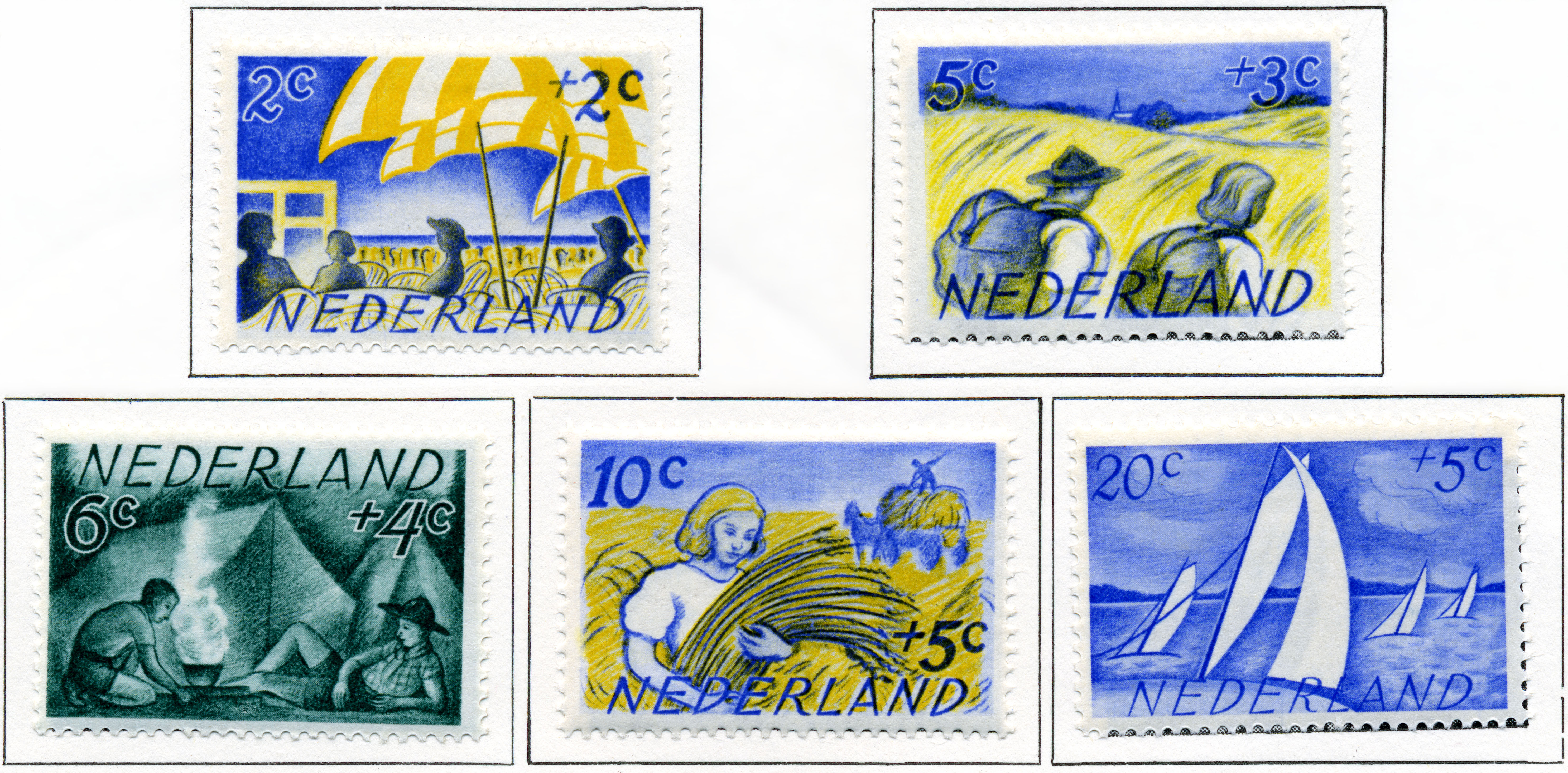 Zomerzegels. Terras aan zeestrand / Trekkers in korenveld / Kampeerders / Meisje bij oogst / Zeilbootjes. Ontwerp door Paul Citroen. NVPH nr 513-517